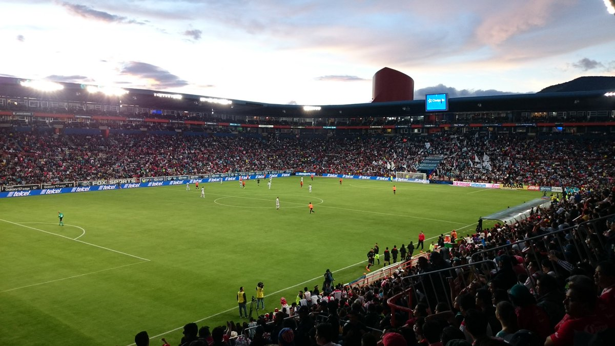 Pachuca vs Necaxa 2016 Estadio Hidalgo